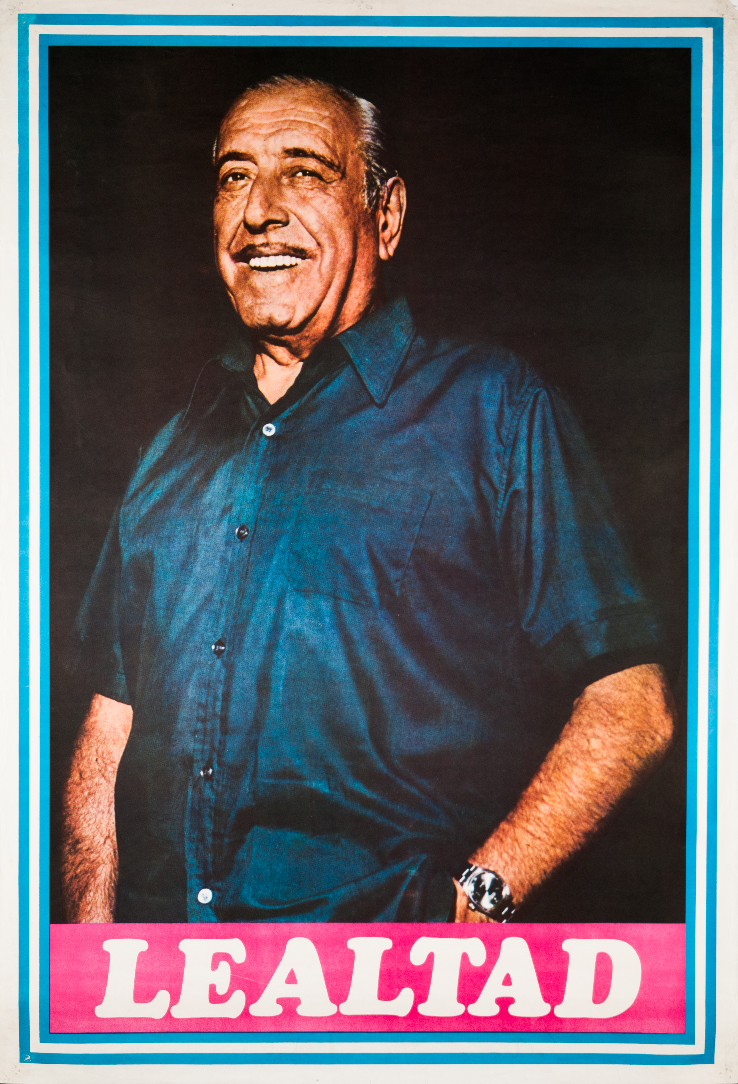 Héctor Campora, candidato del FREJULI para las elecciones del 11 de marzo de 1973.